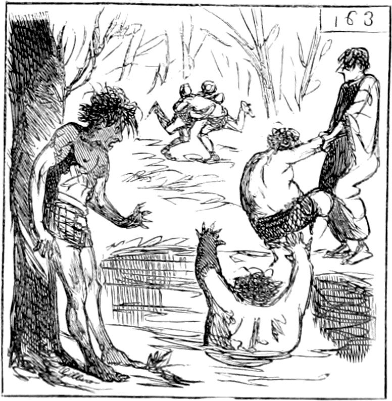 103. — M. BAZILLE. Se jetant à l’eau dans l’espoir de se débarrasser de la couleur que le peintre leur a mis dessus.